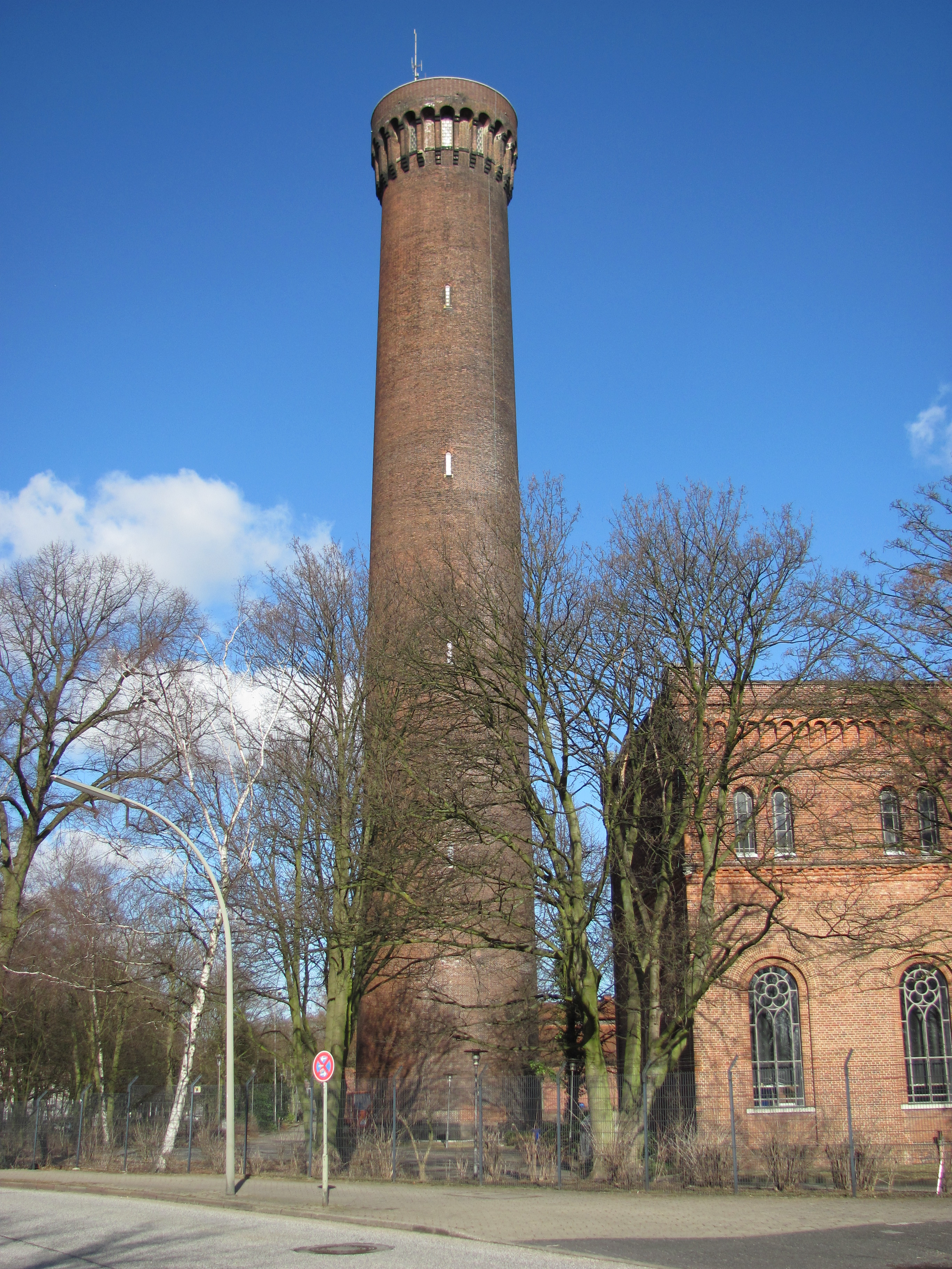 Wasserturm in Hamburg-Rothenburgsort This is a photograph of an architectural monument.